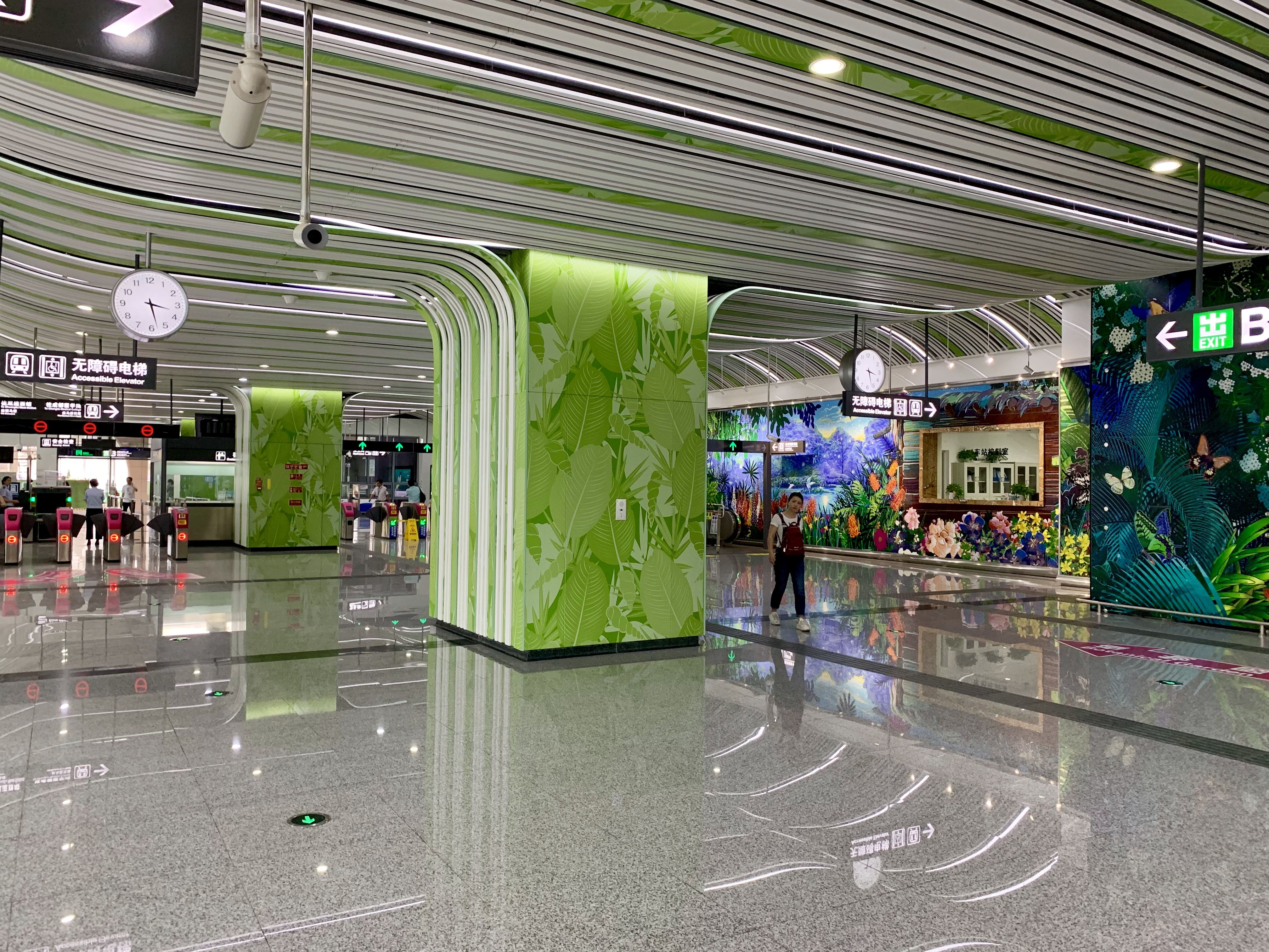 成都地铁植物园站